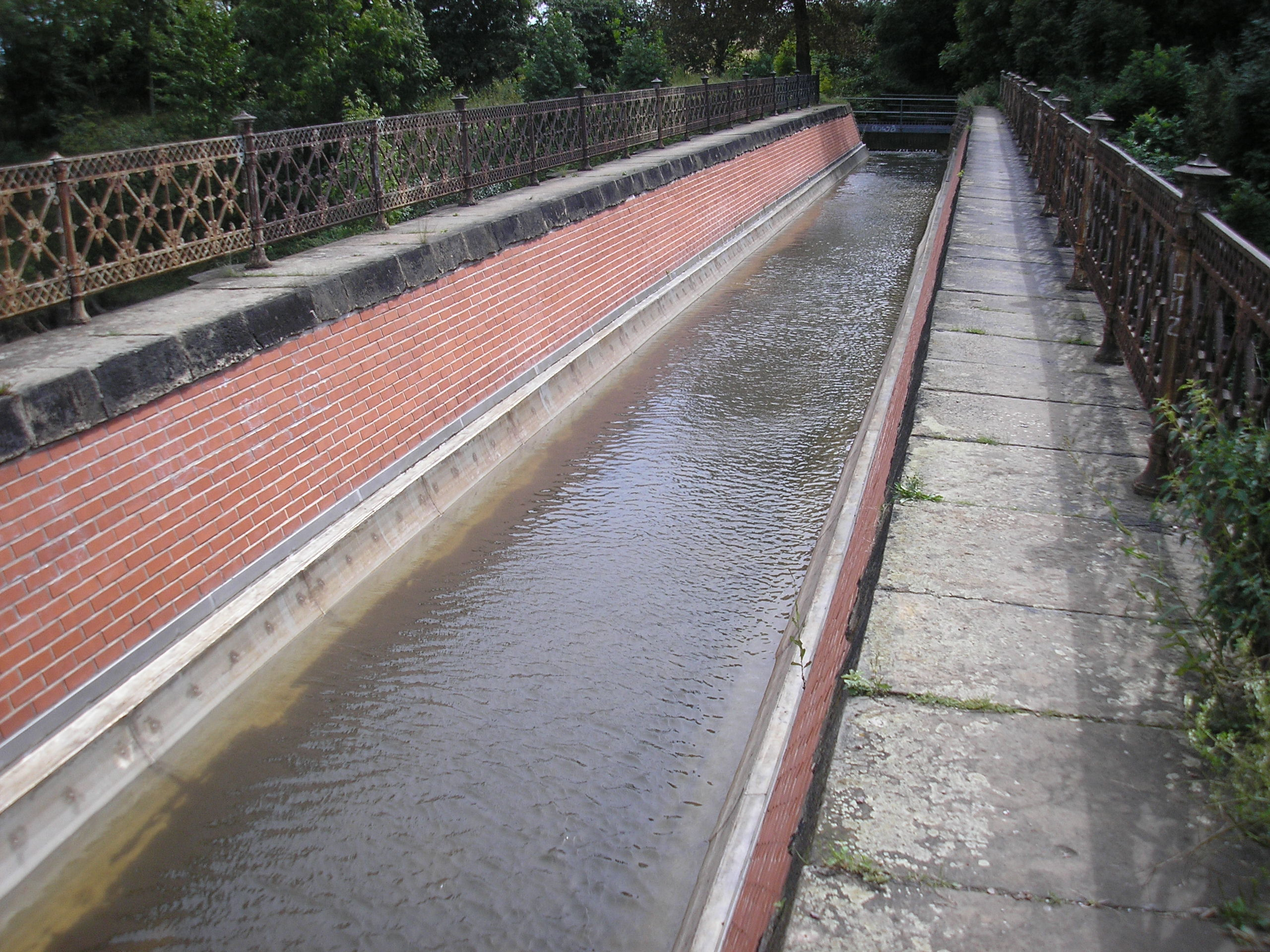 Ansicht des Aquädukts des Leinakanals über die ehemalige Trasse der Thüringer Bahn bei Gotha von oben.